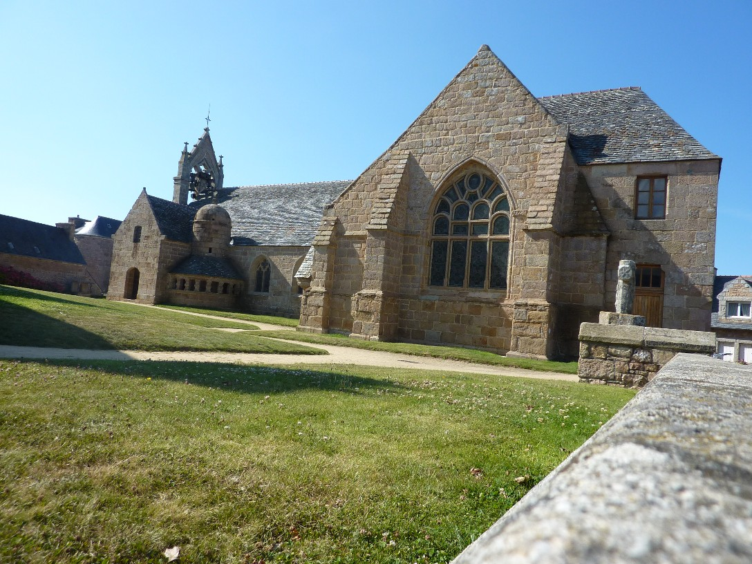 église du bourg